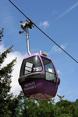 Gondel Rivera - Ale Foppa (Monte Tamaro)